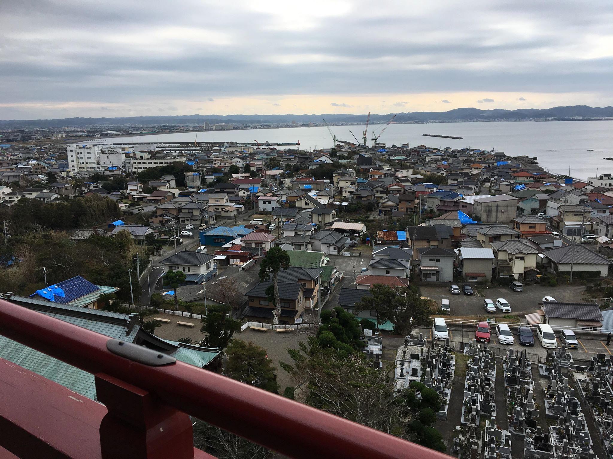 令和元年台風15号の被害を示すブルーシートが点在する館山市街（2019年11月9日撮影）